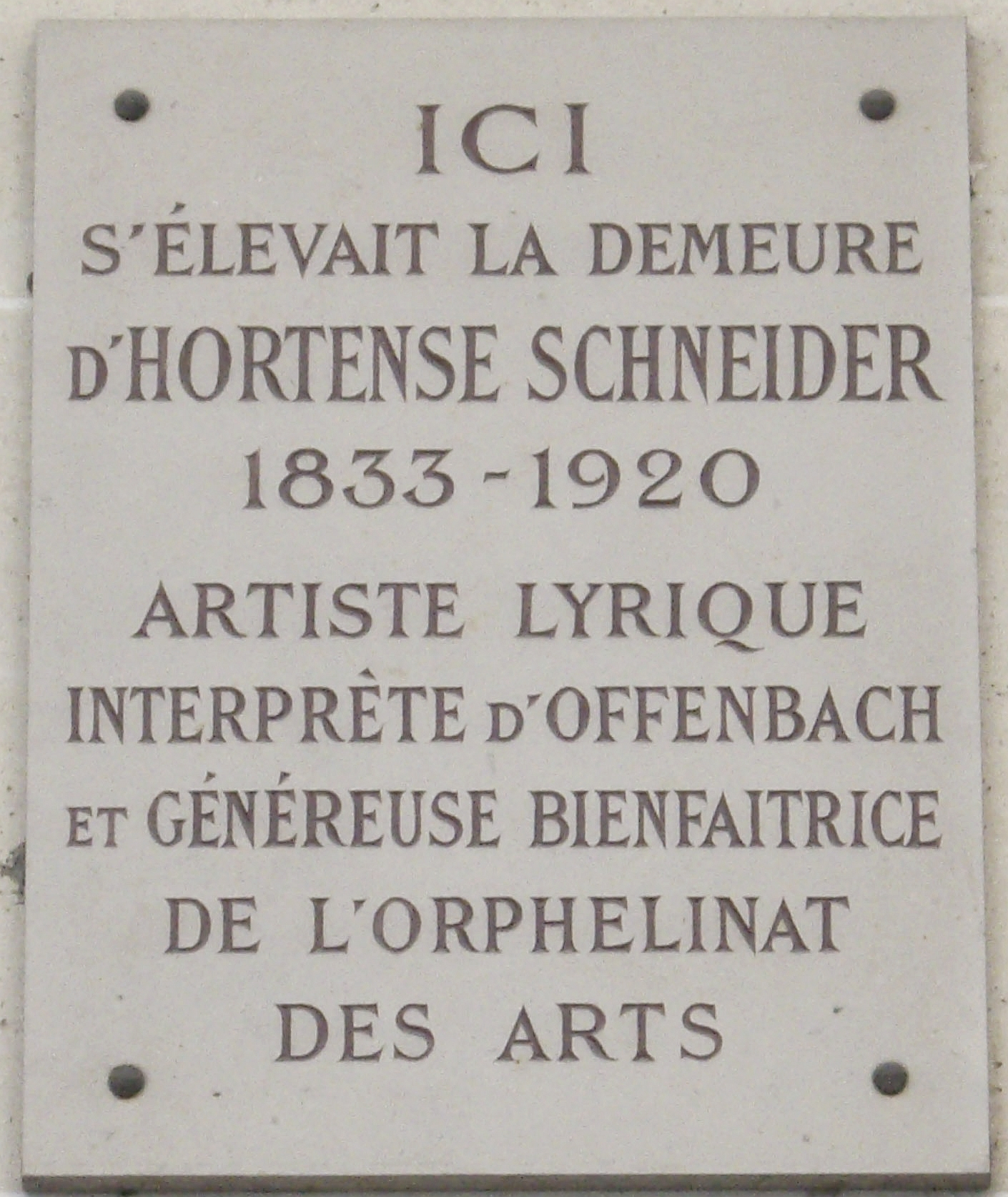 Plaque commémorative, 123 avenue de Versailles, Paris 16e. « Ici s'élevait la demeure d'Hortense Schneider, 1833-1920, artiste lyrique interprète d'Offenbach et généreuse bienfaitrice de l'Orphelinat des Arts. »